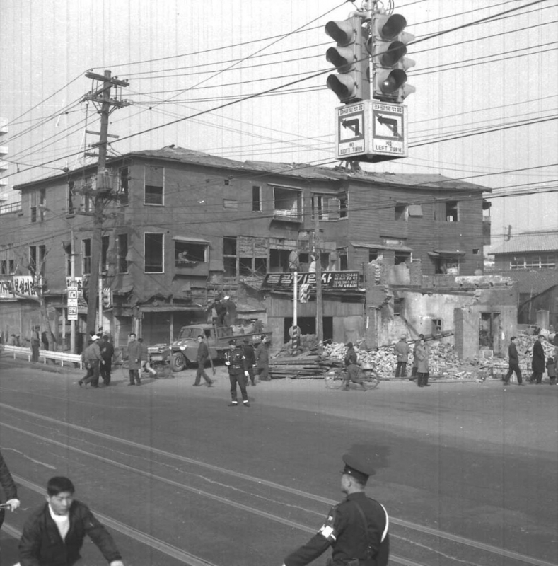 퇴계로에서 중앙극장 앞을 거쳐 청계천에 이르는 3.1로 확장공사 현장 및 신호등